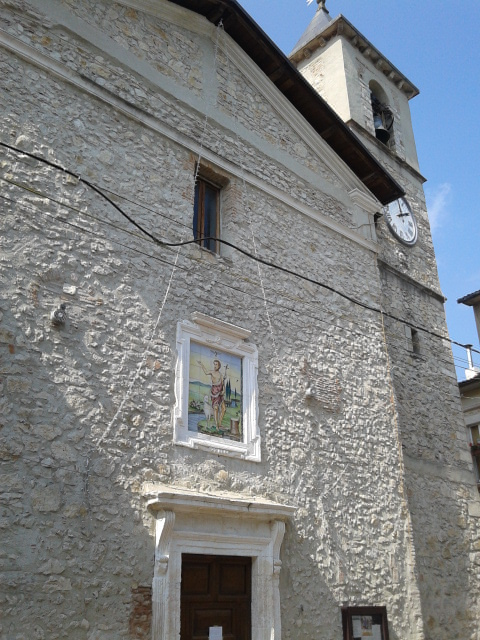 Chiesa di San Giovanni Battista a San Giovanni nella Marsica